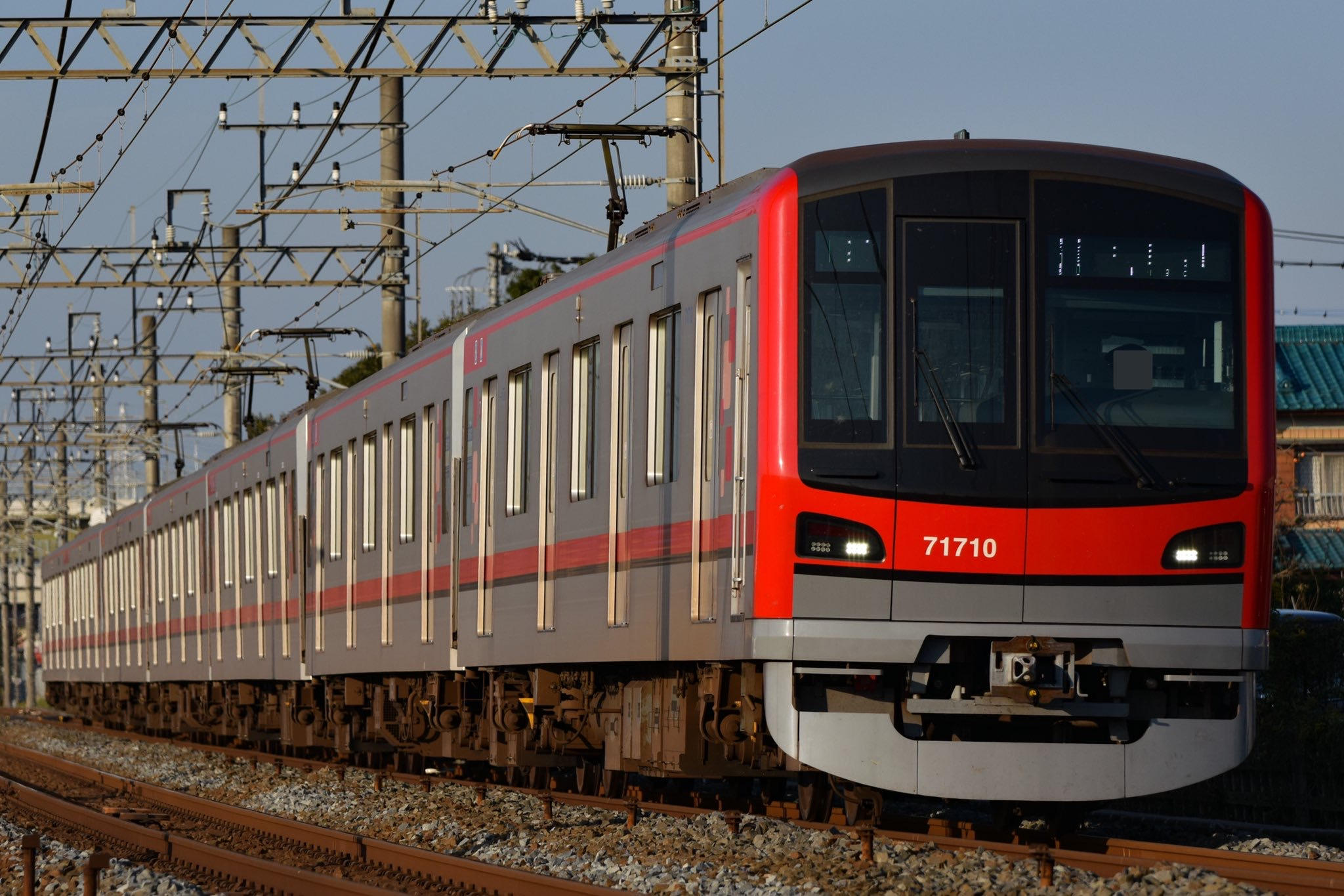 東武70000系71710編成 普通中目黒行き